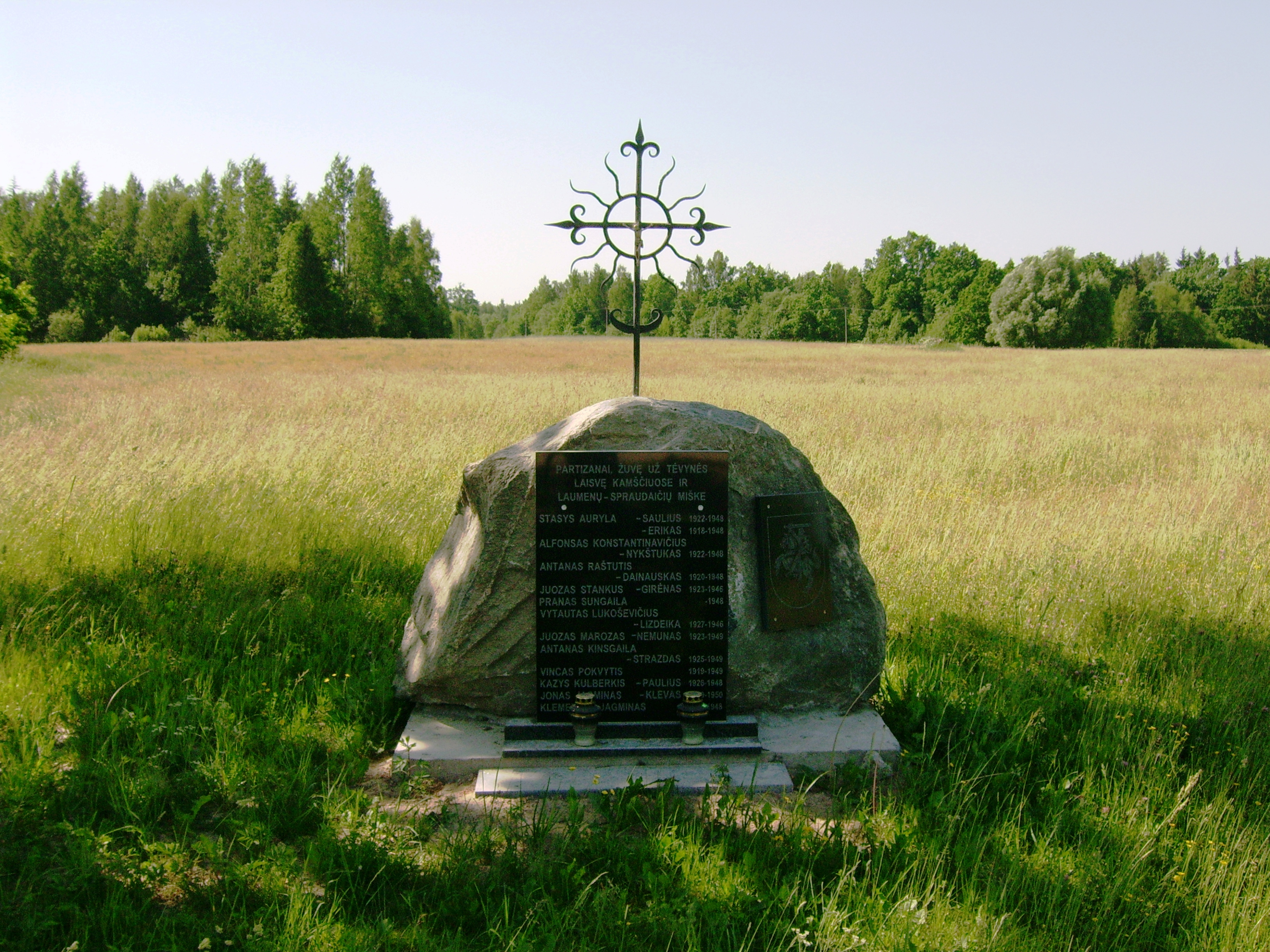 Spraudaičių paminklas partizanams